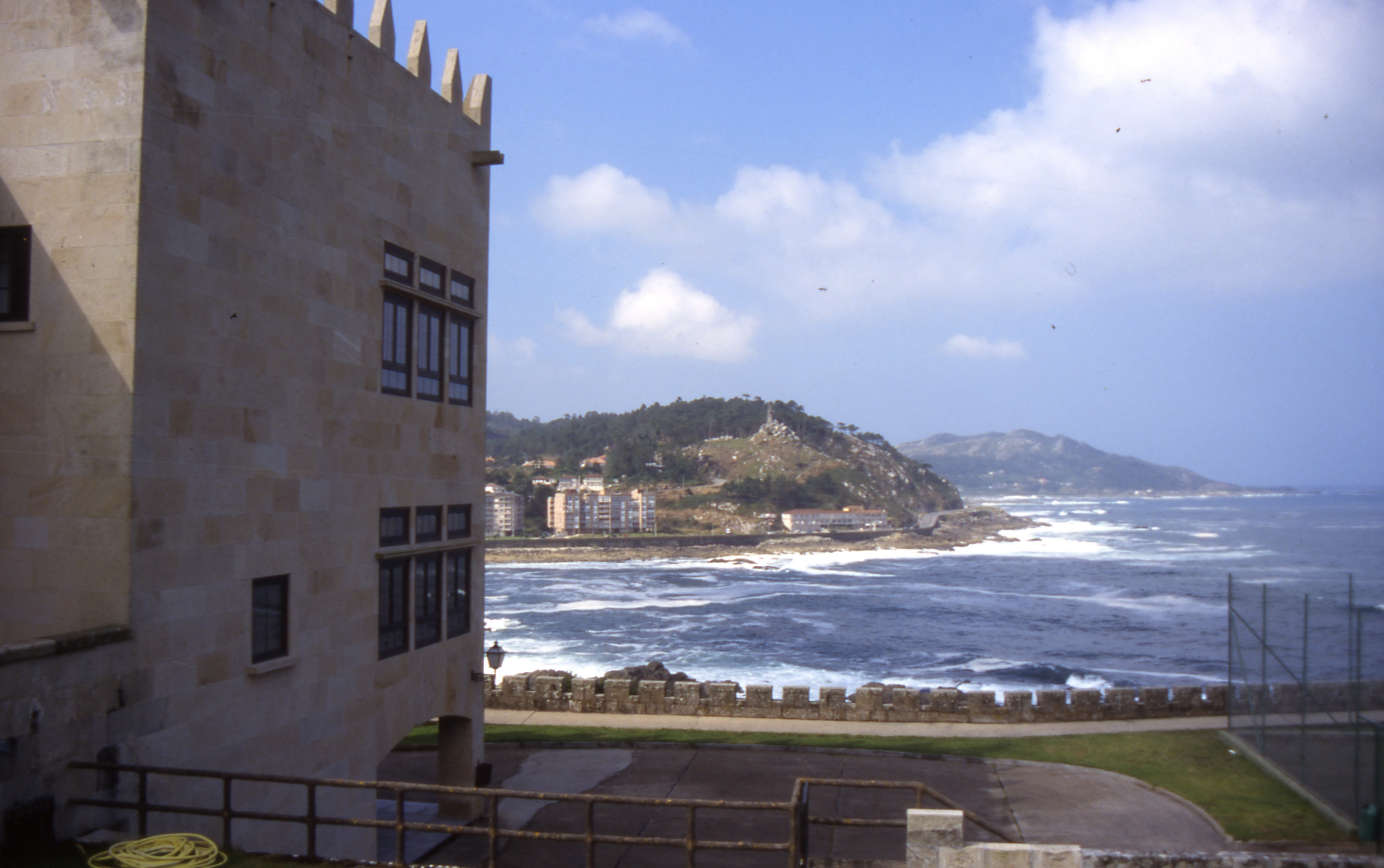 ParadorBaionaAnsicht1